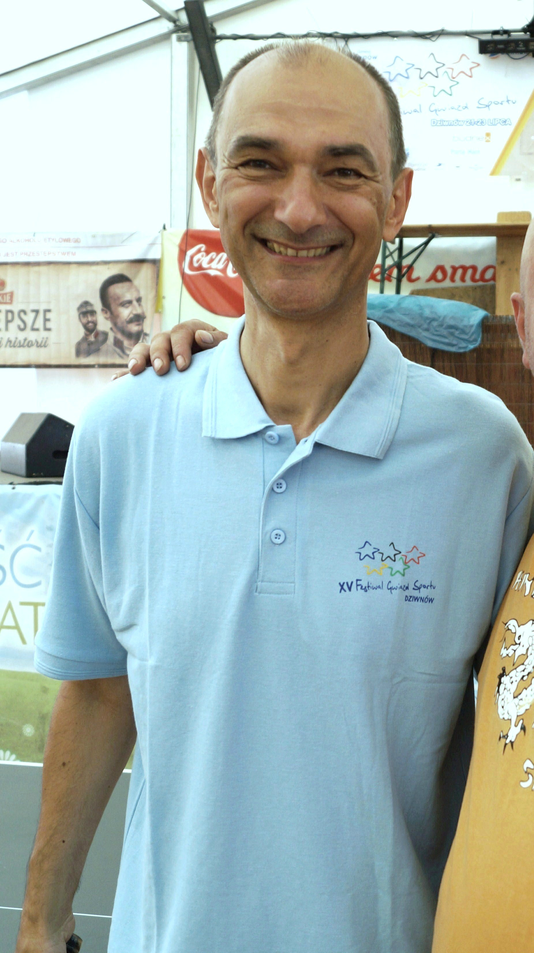 Leszek Kucharski, gdański tenisista stołowy.